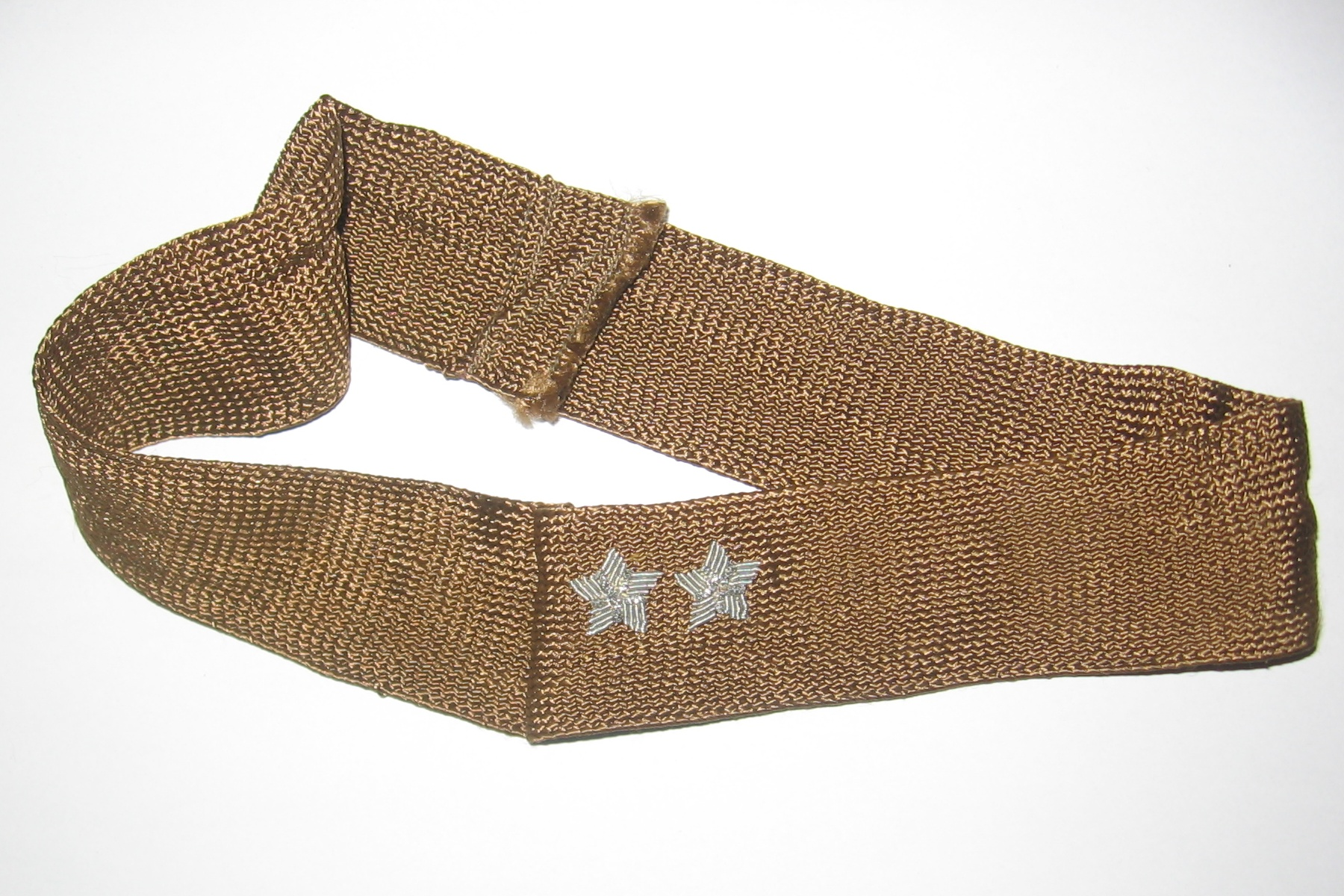 Wstążka otoku czapki żołnierza wojsk lądowych Ludowego Wojska Polskiego (z okresu pomiędzy latami 50. XX wieku a reformą mundurową w Wojsku Polskim w latach 90.) z naszytymi dwiema gwiazdkami, które oznaczać mogły - w zależności od tego, czy otok założony zostanie na czapkę bez galonu na daszku, z jednym lub z dwoma galonami - odpowiednio starszego chorążego, podporucznika lub podpułkownika